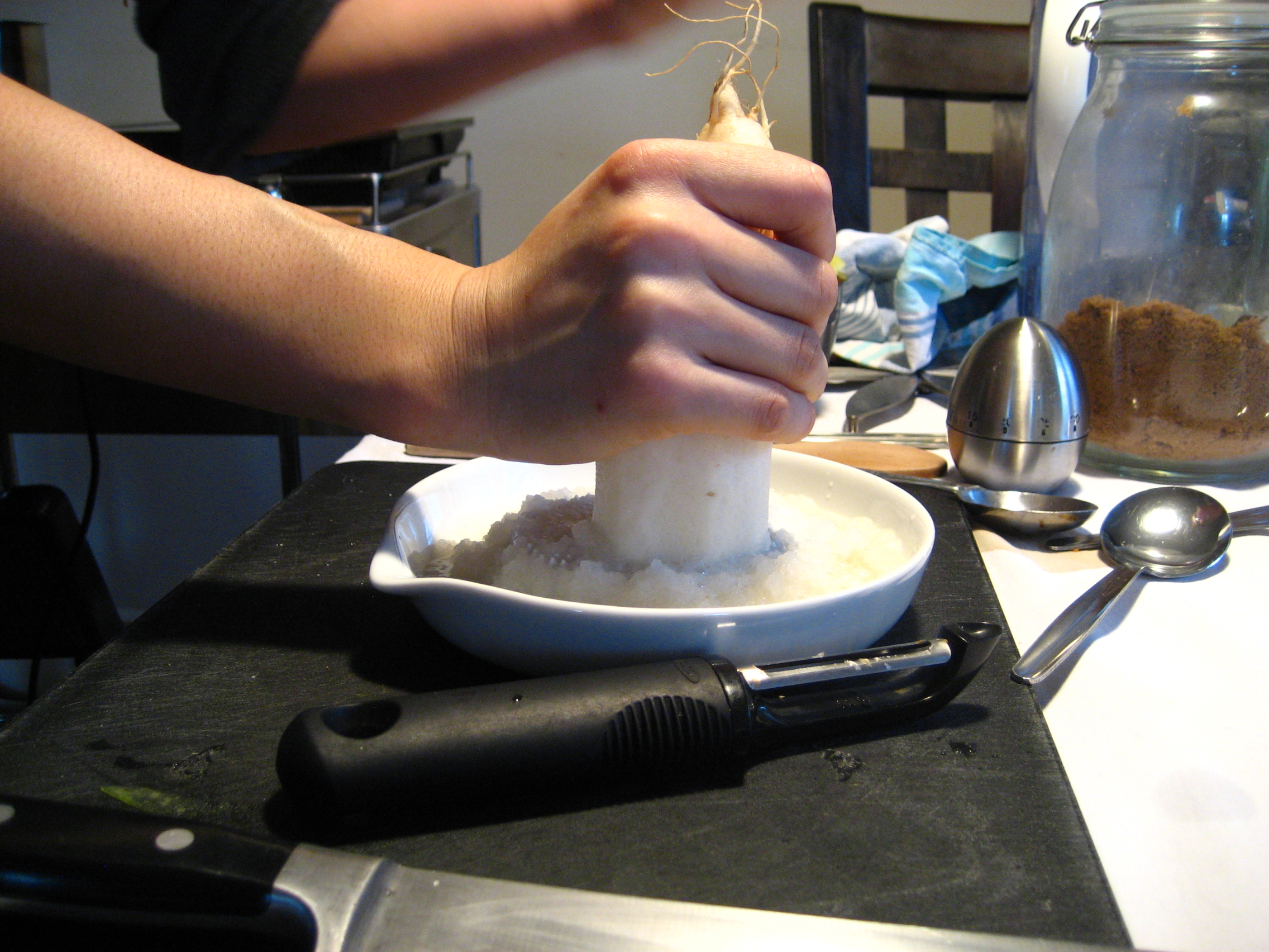 Grating daikon